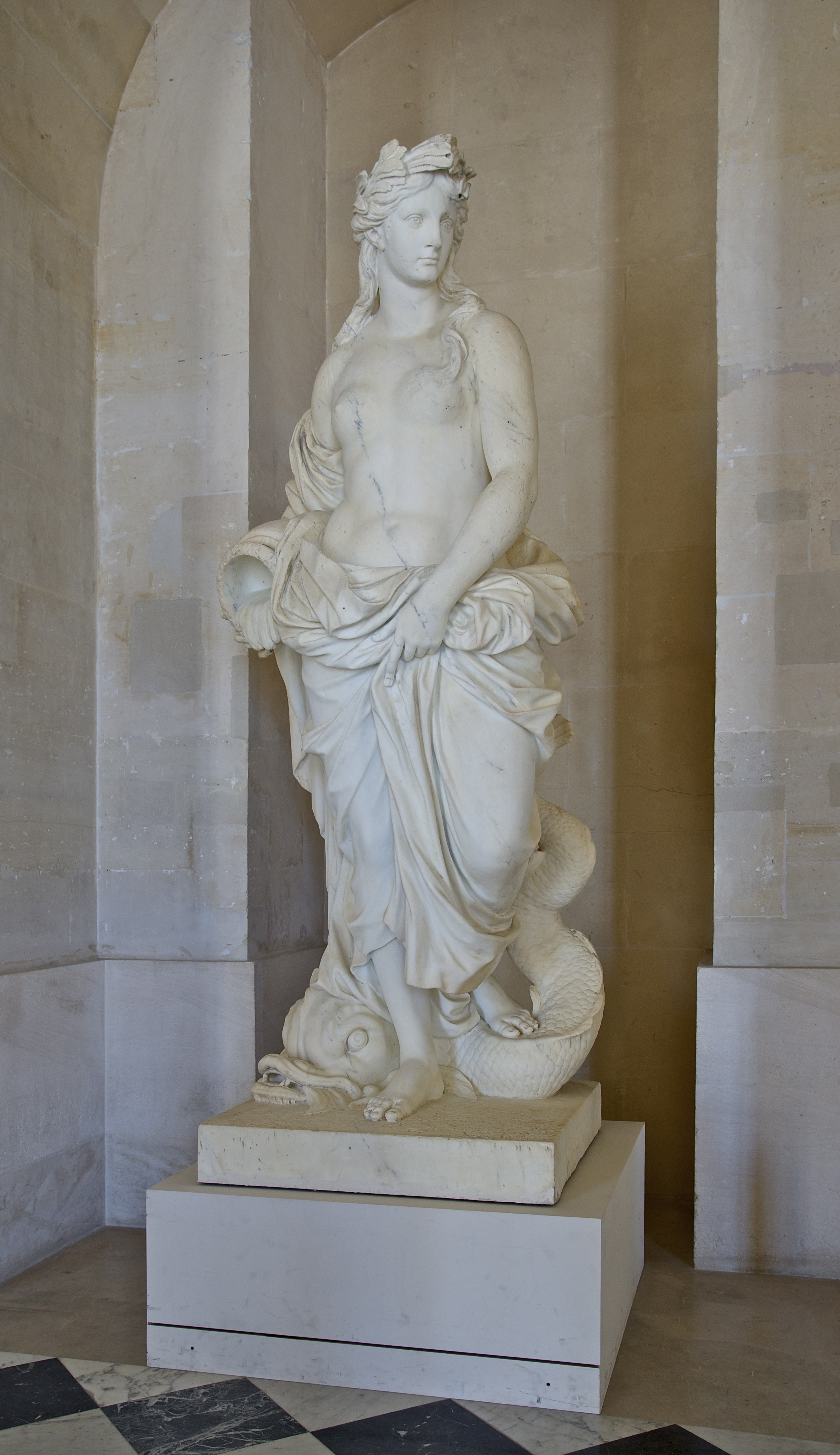 Jeune femme couronnée de joncs, vêtue d'une draperie et tenant une urne renversée, pied gauche posé sur un dauphin.